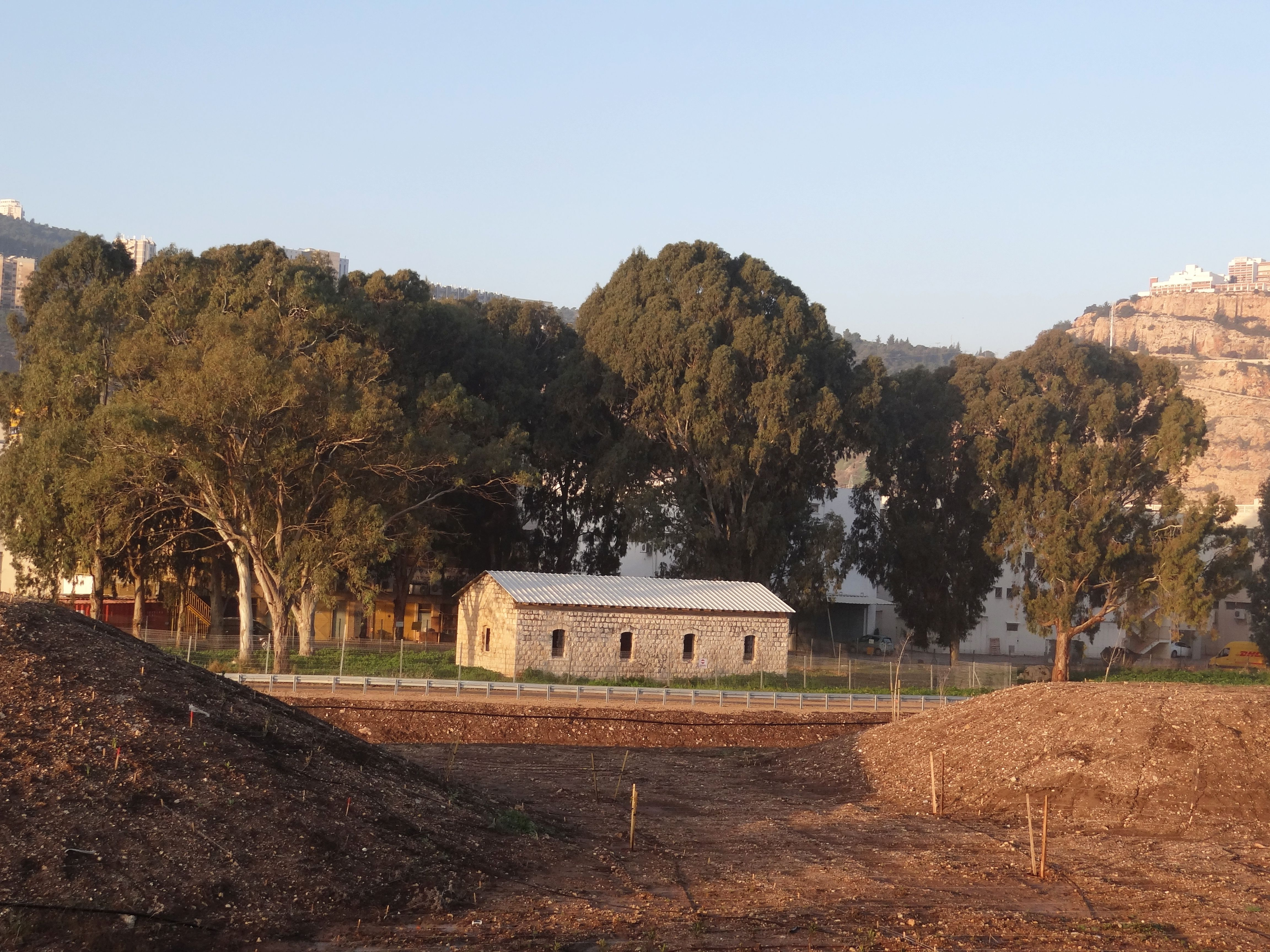 בית המסילאים בתחנת 4.5 . המבנה הוכר כאתר מורשת על ידי המועצה לשימור אתרים, הועבר לתפעולה של עיריית נשר שתפתח את המקום לרווחת התושבים. הצילום מהסוללה של רכבת העמק החדשה